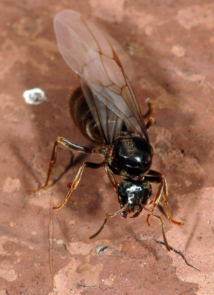 Lasius niger - geflügelte Königin, Frankfurt am Main, Hessen, Deutschland